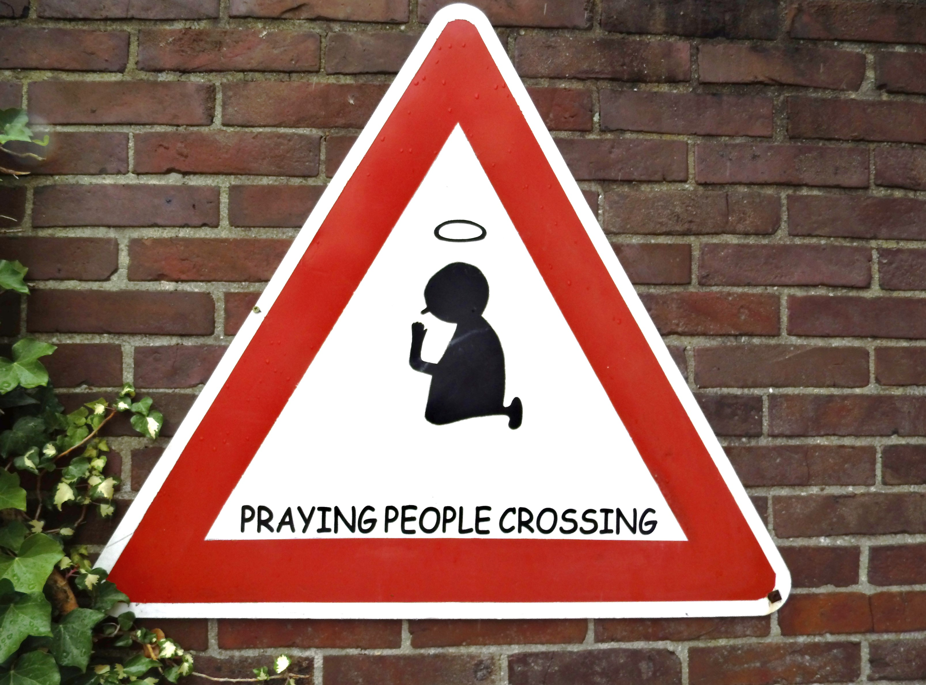 Schild an der Grundstücksmauer eines Hauses in Jever